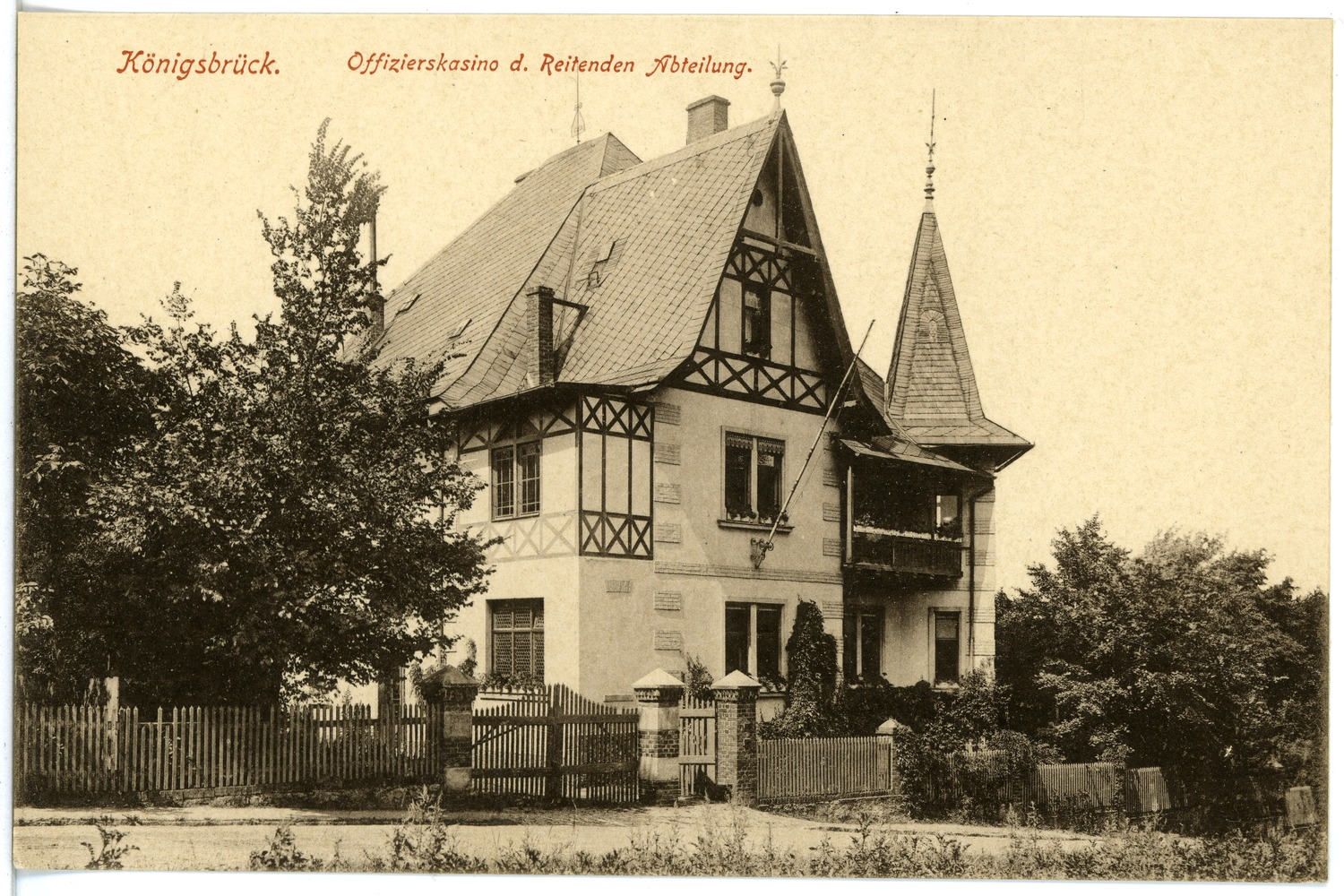 Königsbrück; Offizierskasino der Reitende Abteilung This postcard is from publisher Brück & Sohn in Meißen ( postcard has a unique number 18269 and is available in a higher resolution at the publisher. This images was uploaded in a cooperation project between Wikipedians and the publisher.